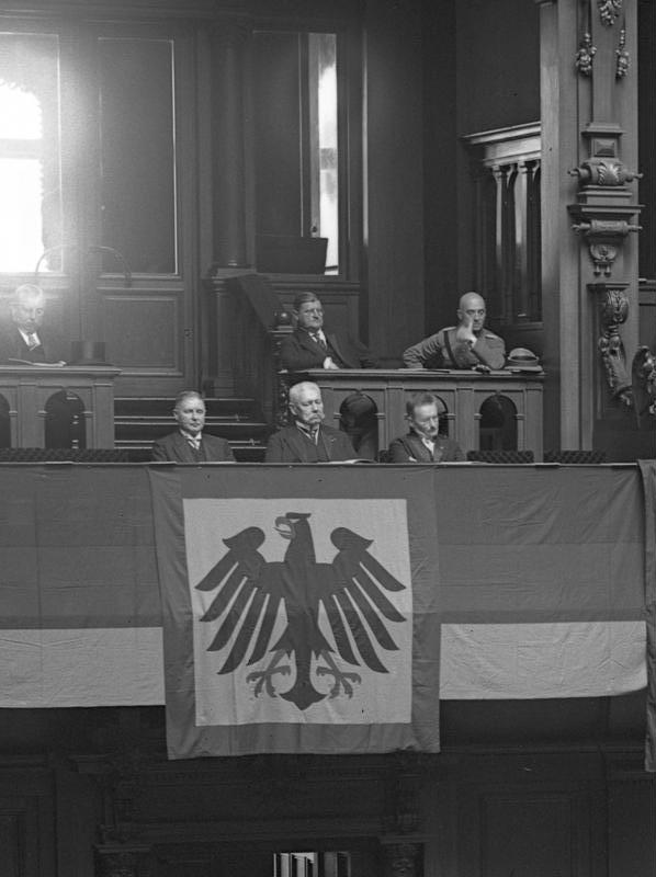 60 Jahre Deutsches Reich ! Der Reichspräsident von Hindenburg in der Loge des Reichstages während der Reichsgründungsfeier. Links neben dem Reichspräsidenten Reichswehrminister Groener, rechts der Präsident des Reichstages Loebe.